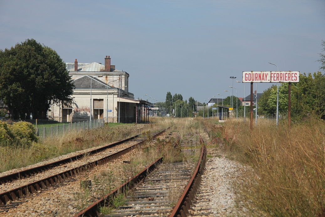 La gare de Gournay-Ferrières désormais désaffectée envahie par la végétation, Ferrières-en-Bray, Seine-Maritime, France.